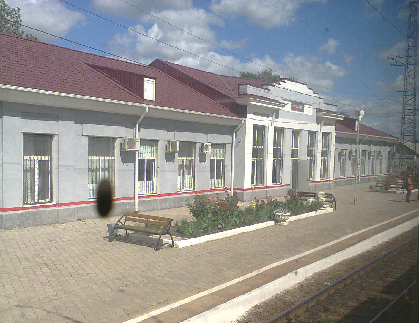 ЖД-станция Каменоломни (СКЖД)